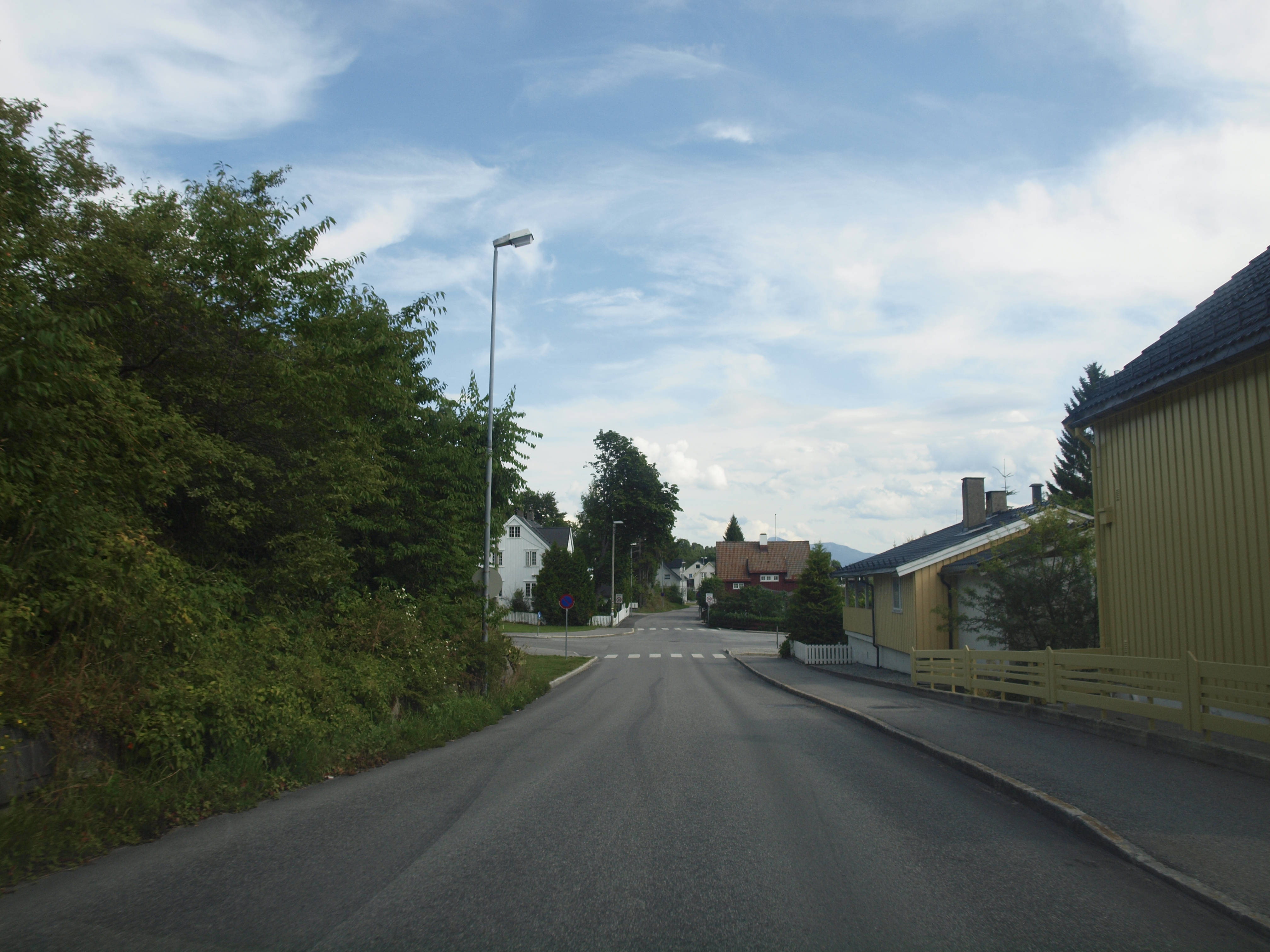 Moldelivegen in Molde